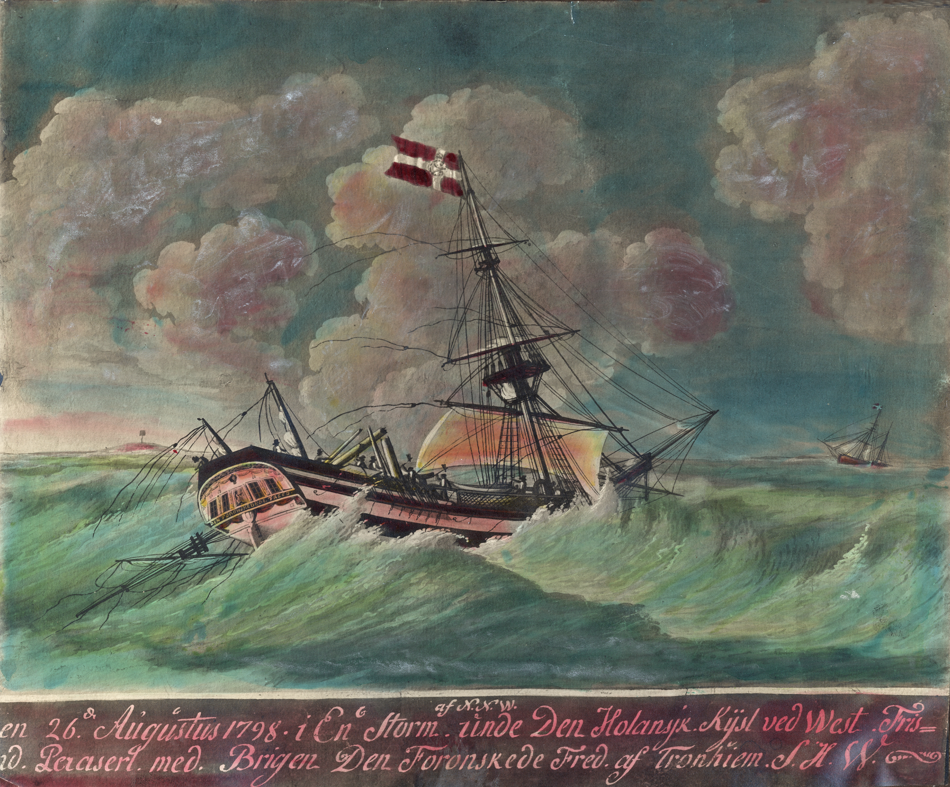 Format: Fotopositiv (kolorert) Dato / Date: 26 August 1798 (hendelsen) Fotograf / Photographer: Ukjent Sted / Place: Den Hollandske kyst utenfor Vestfrisland Eier / Owner Institution: Trondheim byarkiv, The Municipal Archives of Trondheim Arkivreferanse / Archive reference: Tor.H44 - F9385